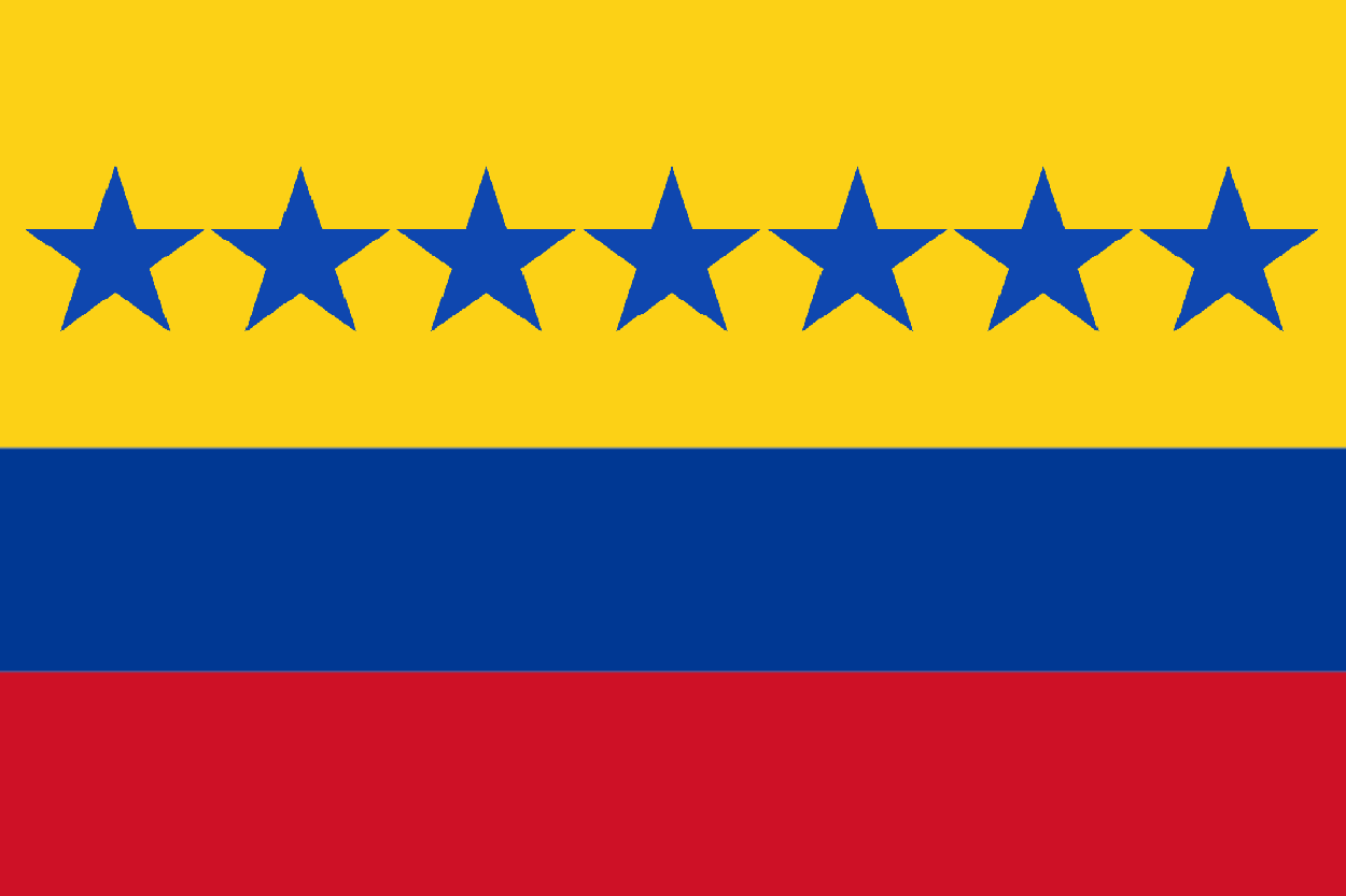 Bandera de la segunda república.